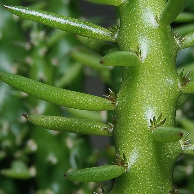 Own plant